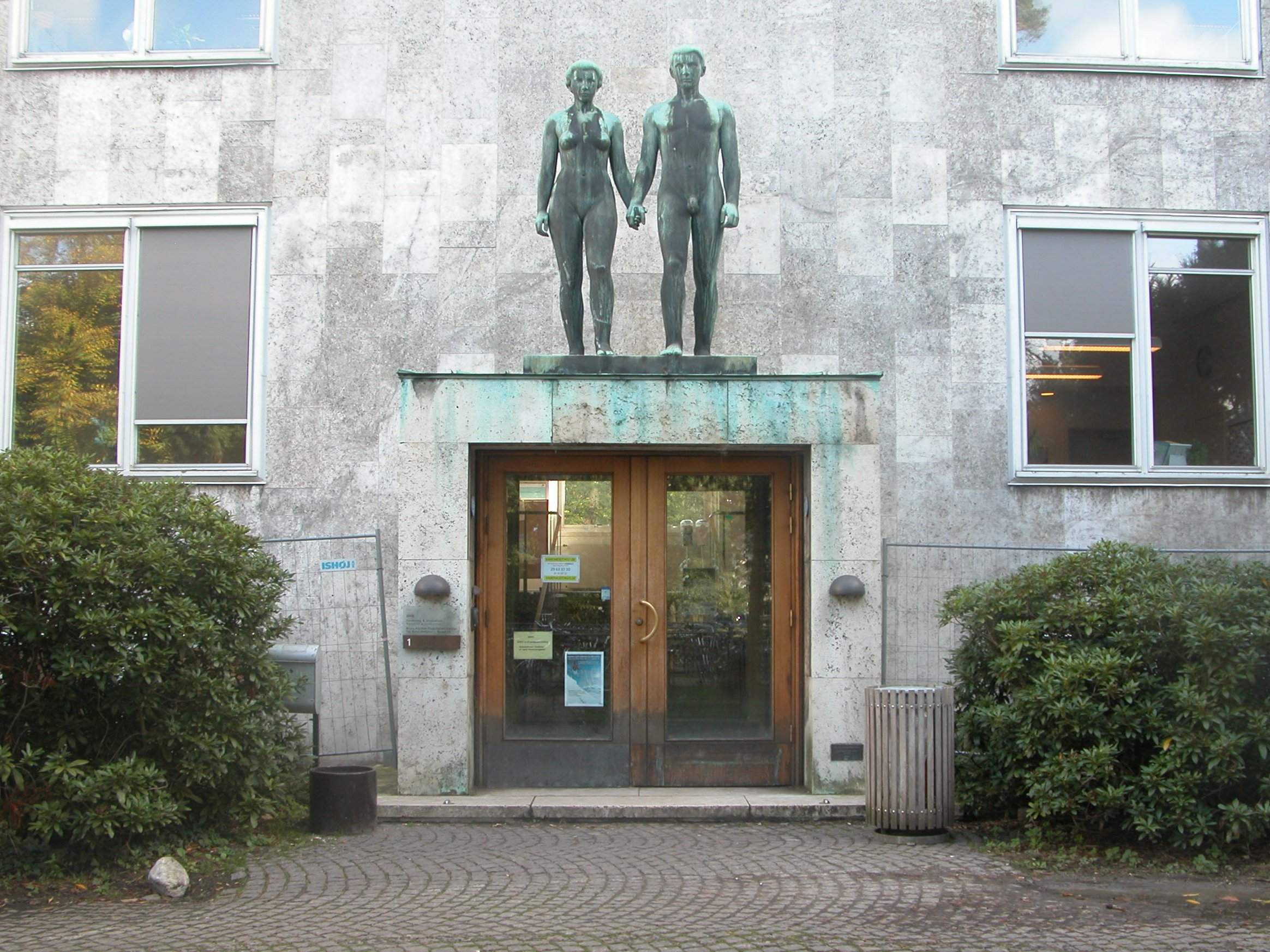 Datalogisk Institut at Københavns Universitet in Copenhagen, Denmark